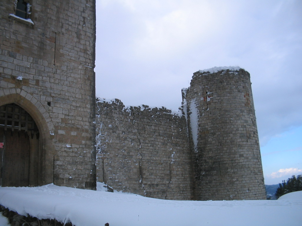 chateau de Puivert.